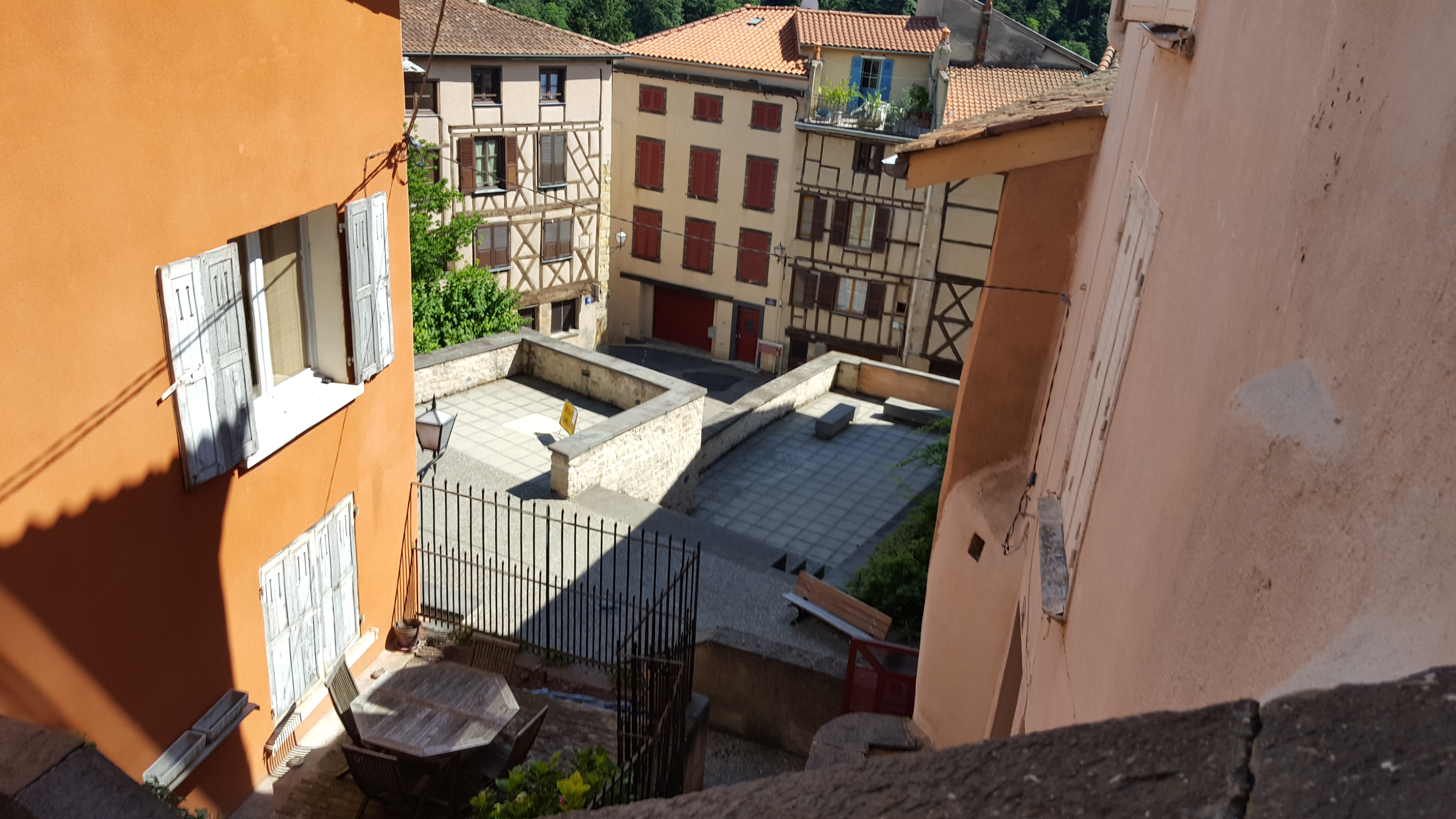 Placette à Thiers 63